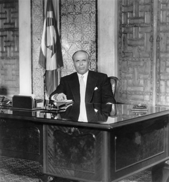 Habib Bourguiba, président de la République tunisienne, à son bureau